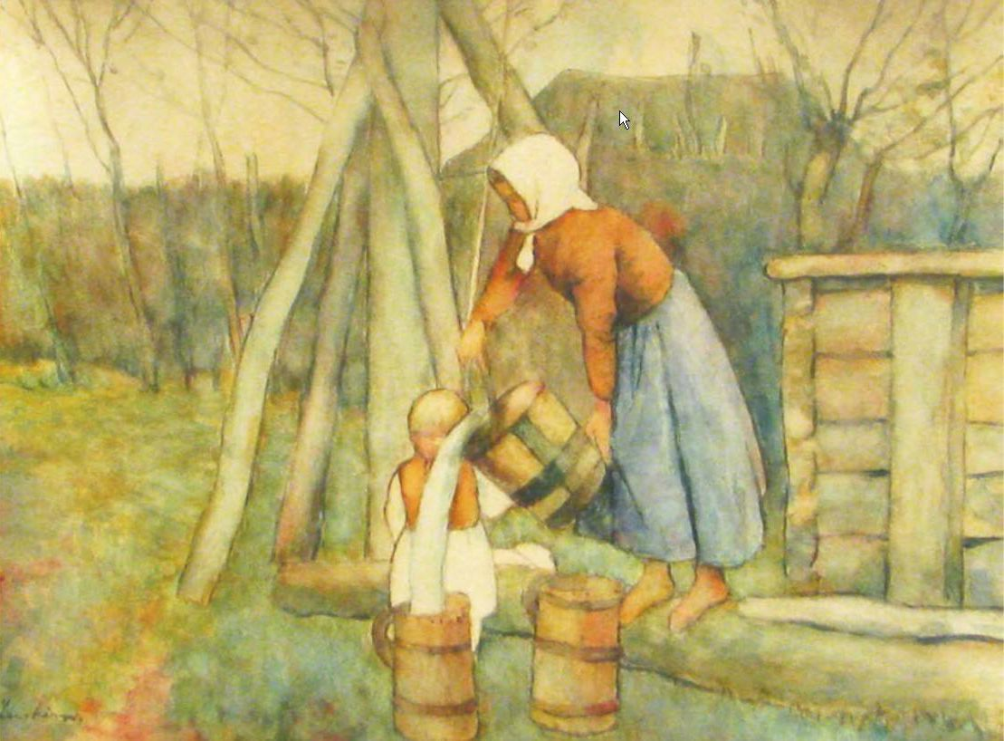 Ştefan Luchian - La fântână, acuarelă. Tabloul a făcut parte din fosta colecţie Ioan Nicolau, şi a fost expus în Retrospectiva din 4-31 martie 1939 a Fundaţiei Dalles, desfăşurată sub egida Academiei Române şi sub înaltul patronaj al Regelui Carol al II-lea.